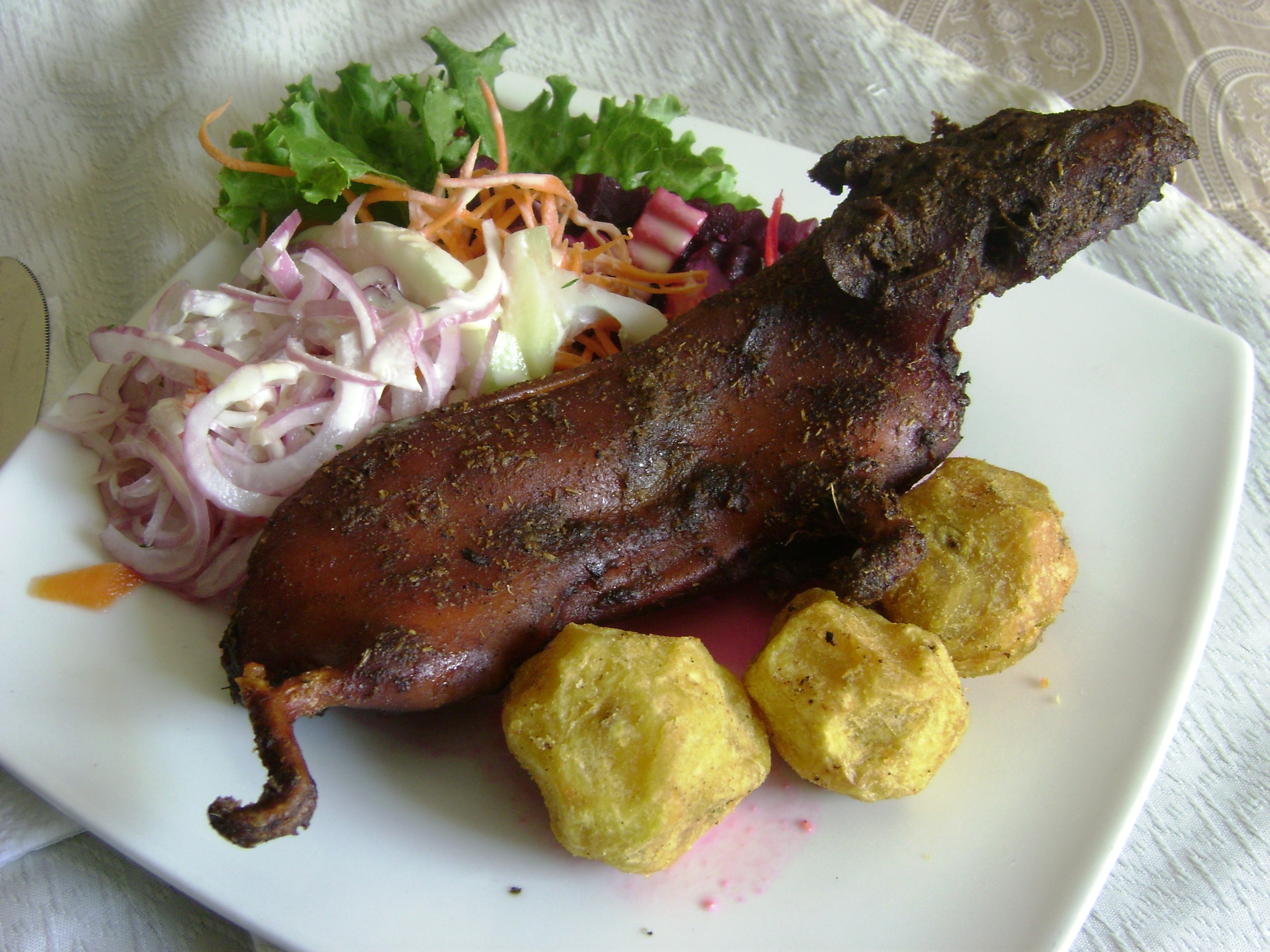 Cuy al horno servido con papas doradas y ensalada. Huaraz, Ancash, Perú.